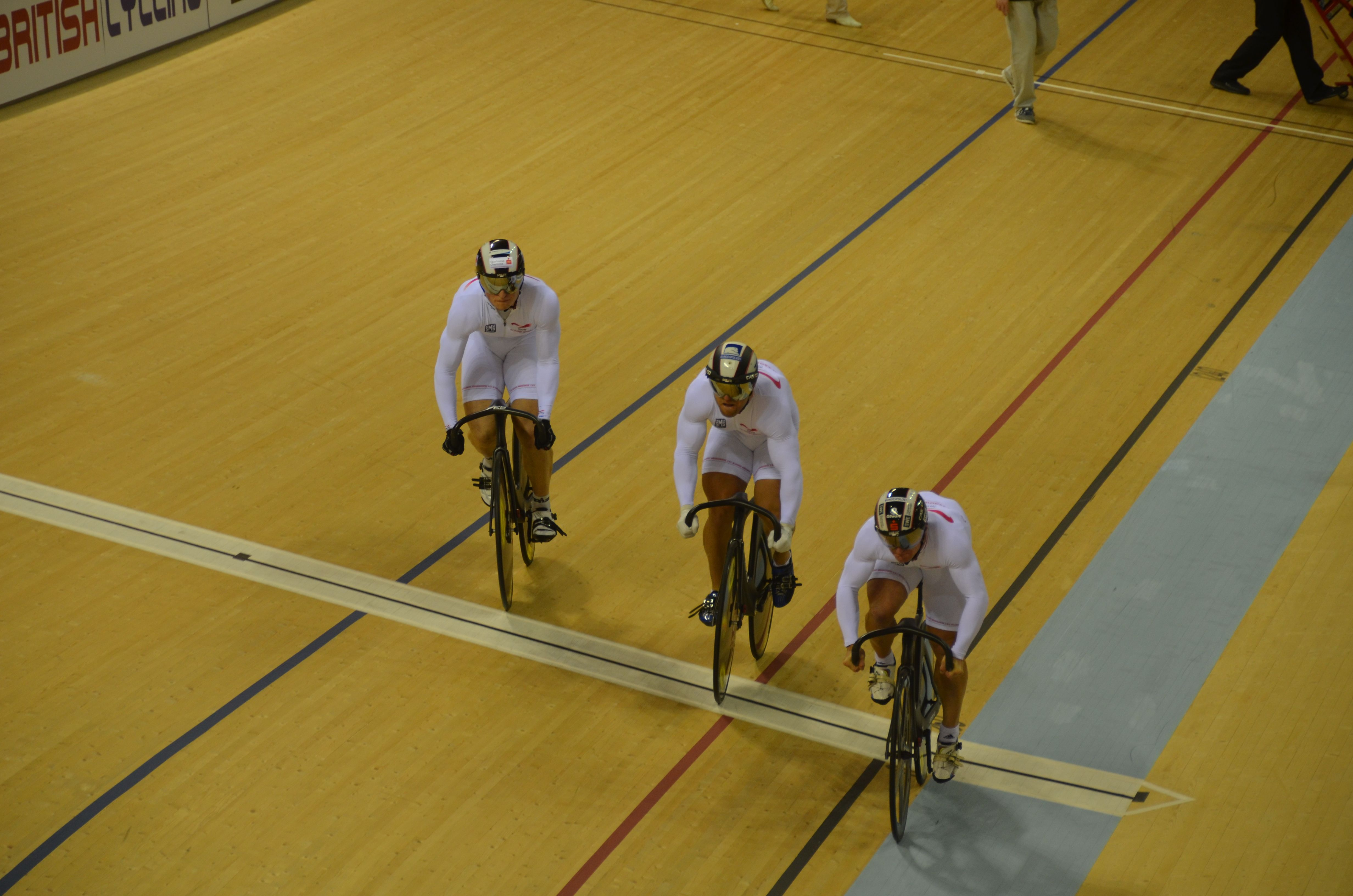 v.l.n.r. Stefan Bötticher, Robert Förstemann, René Enders